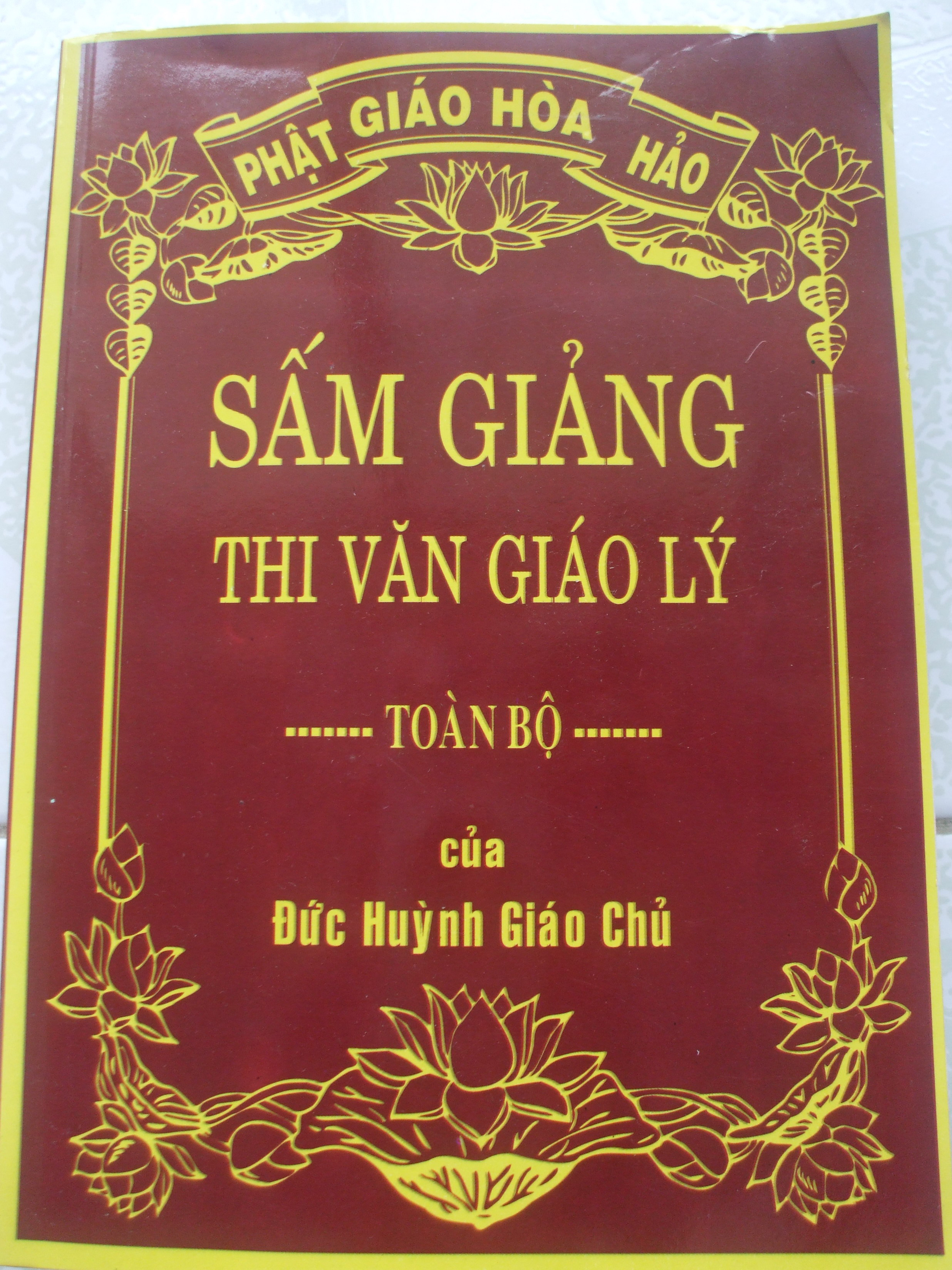 Sấm giảng Phật Giáo Hoà Hảo.